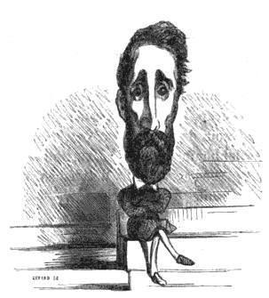 Caricature de Jean-Baptiste Adolphe Charras en 1848-49, par Cham.